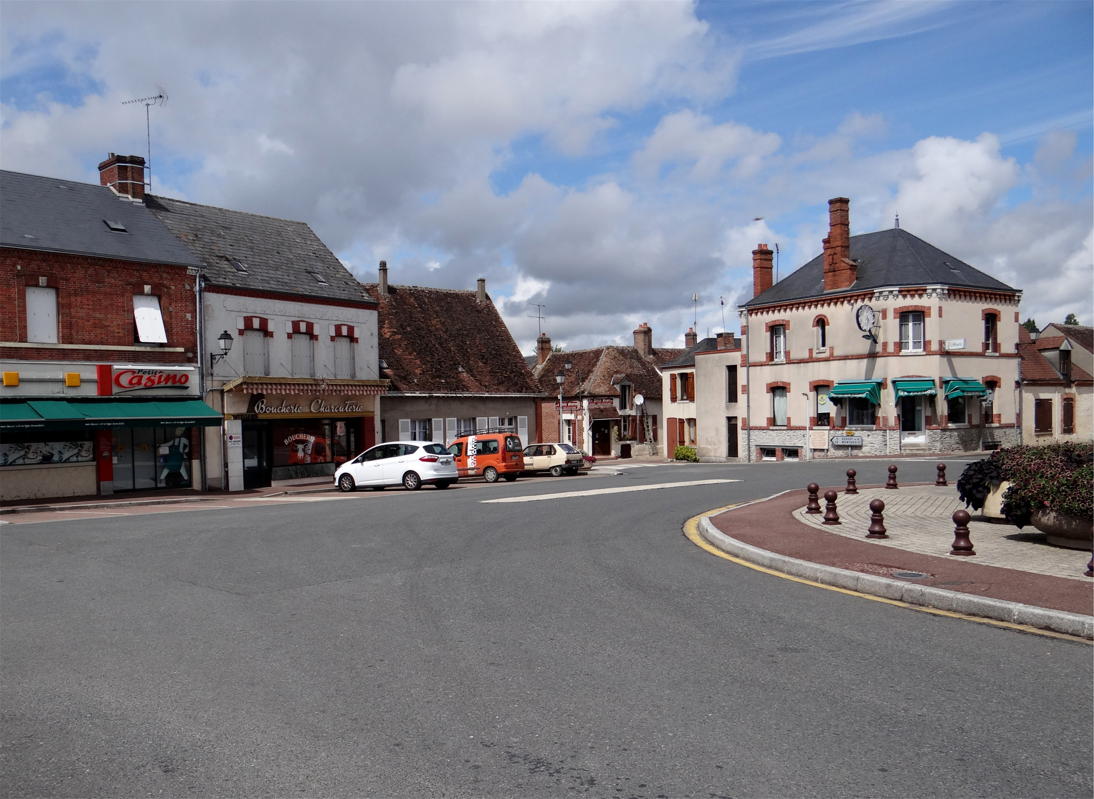 Place Duchesse de Dalmatie, Varennes-Changy, Loiret, France.